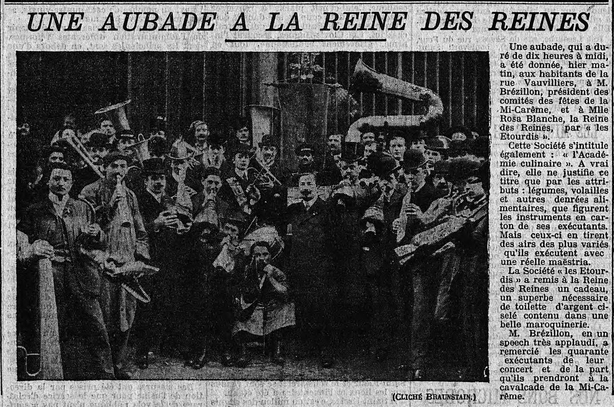 Article sur l' Académie Culinaire ou Les Étourdis, ensemble bigophonique offrant une aubade à la Reine des Reines de Paris à la Mi-Carême 1906.